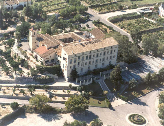 Convento de Aguas Vivas (Carcagente)